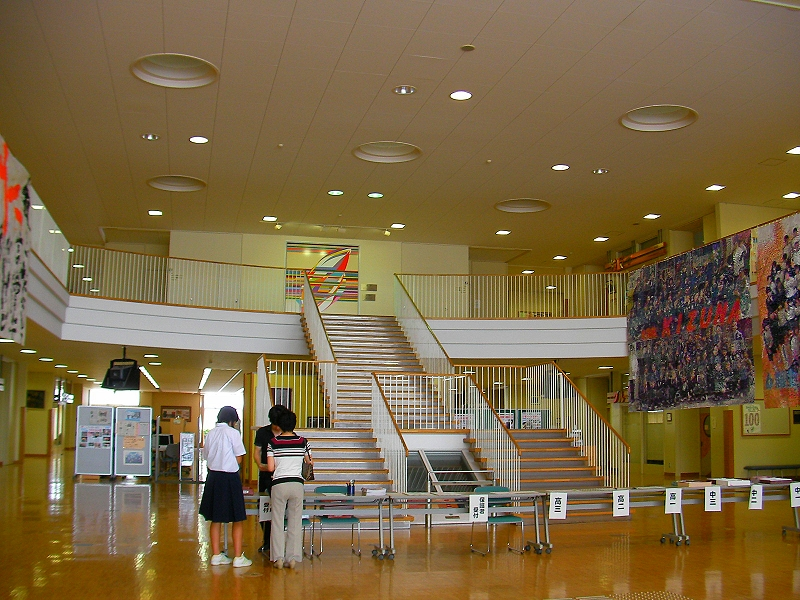 沼津市立沼津高等学校特別教室棟の玄関アトリウム部分を1階床面から見たもの。方向は北→南。平成23年6月12日撮影。なお撮影当日は学校行事があり受付が設営されている。普段は机や椅子が出されているわけではない。